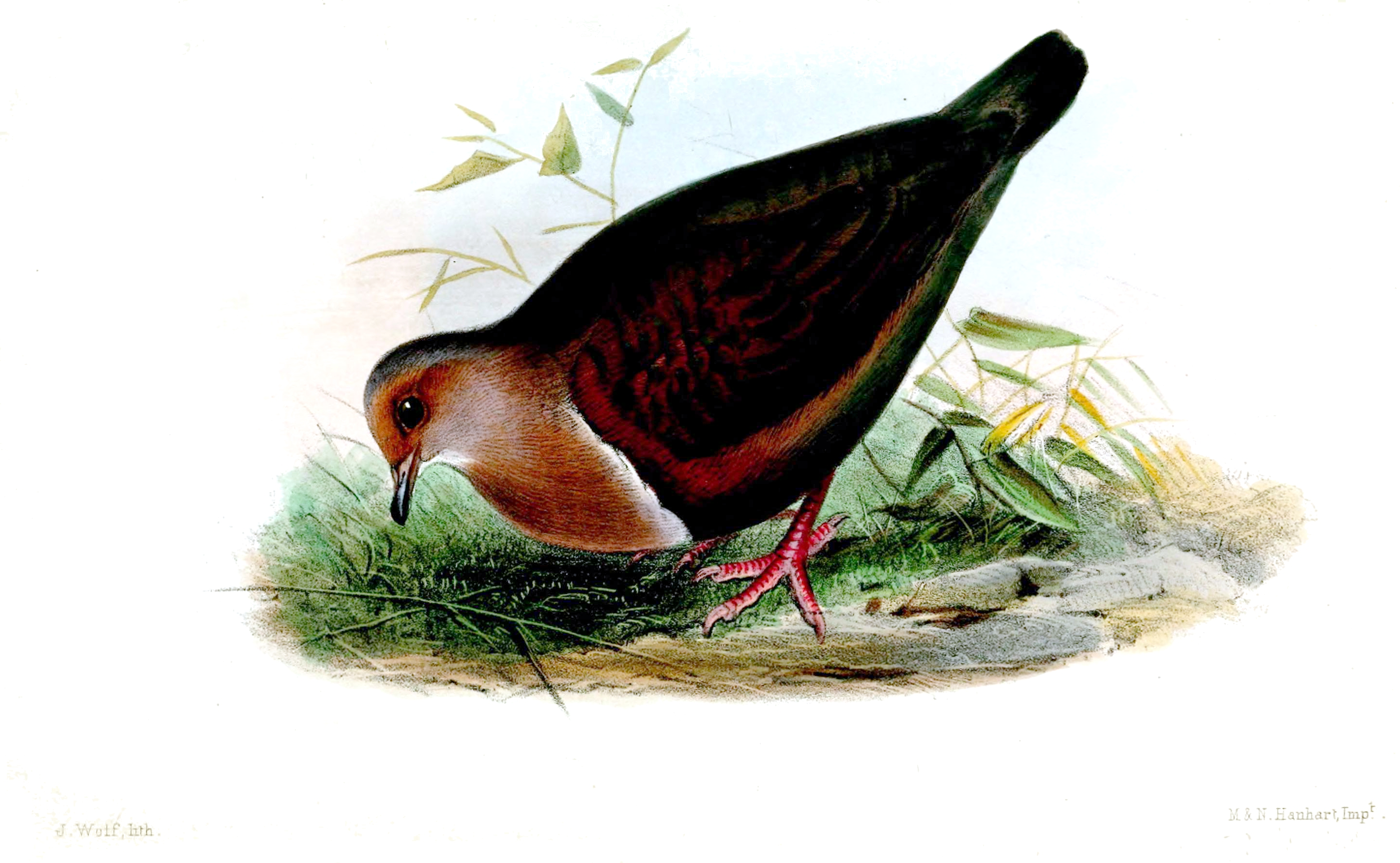 Caloenas (Phlegoenas) stairi=Gallicolumba stairi